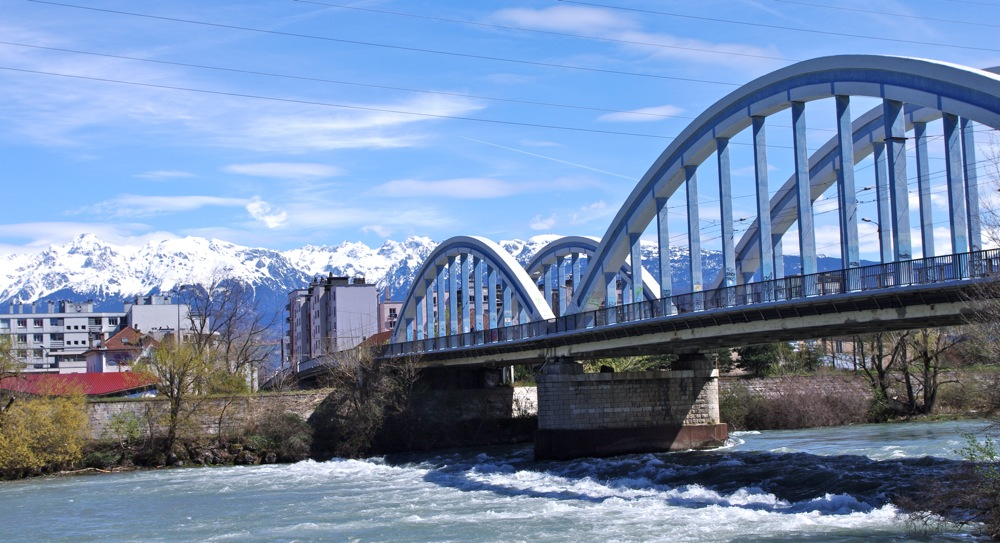 Le Drac à Grenoble sous la passerelle cours Berriat